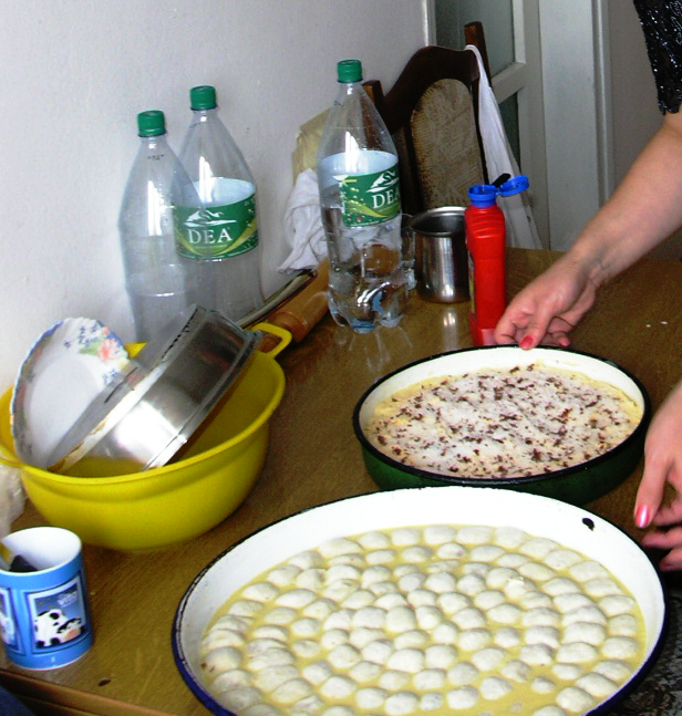 mantija